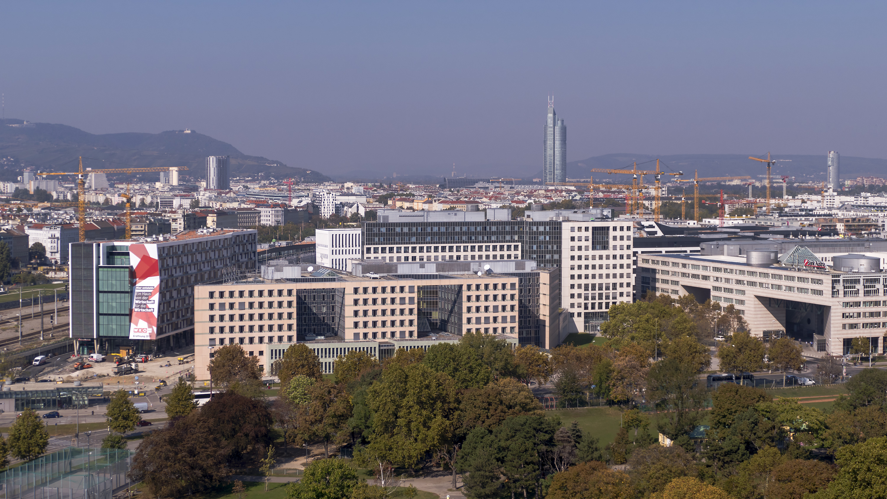 Austria Campus in Wien 2